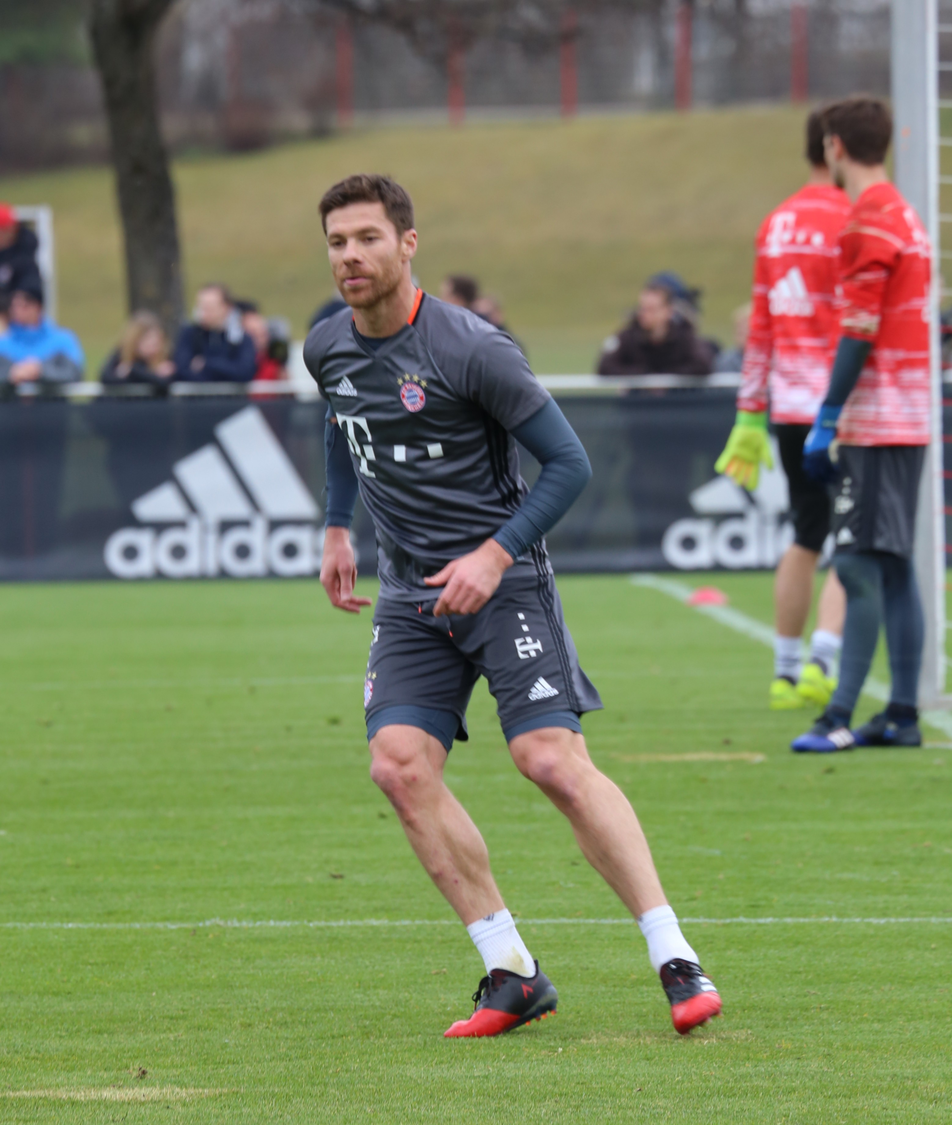 Xabi Alonso am 14. März 2017 beim Training auf dem Gelände des FC Bayern München